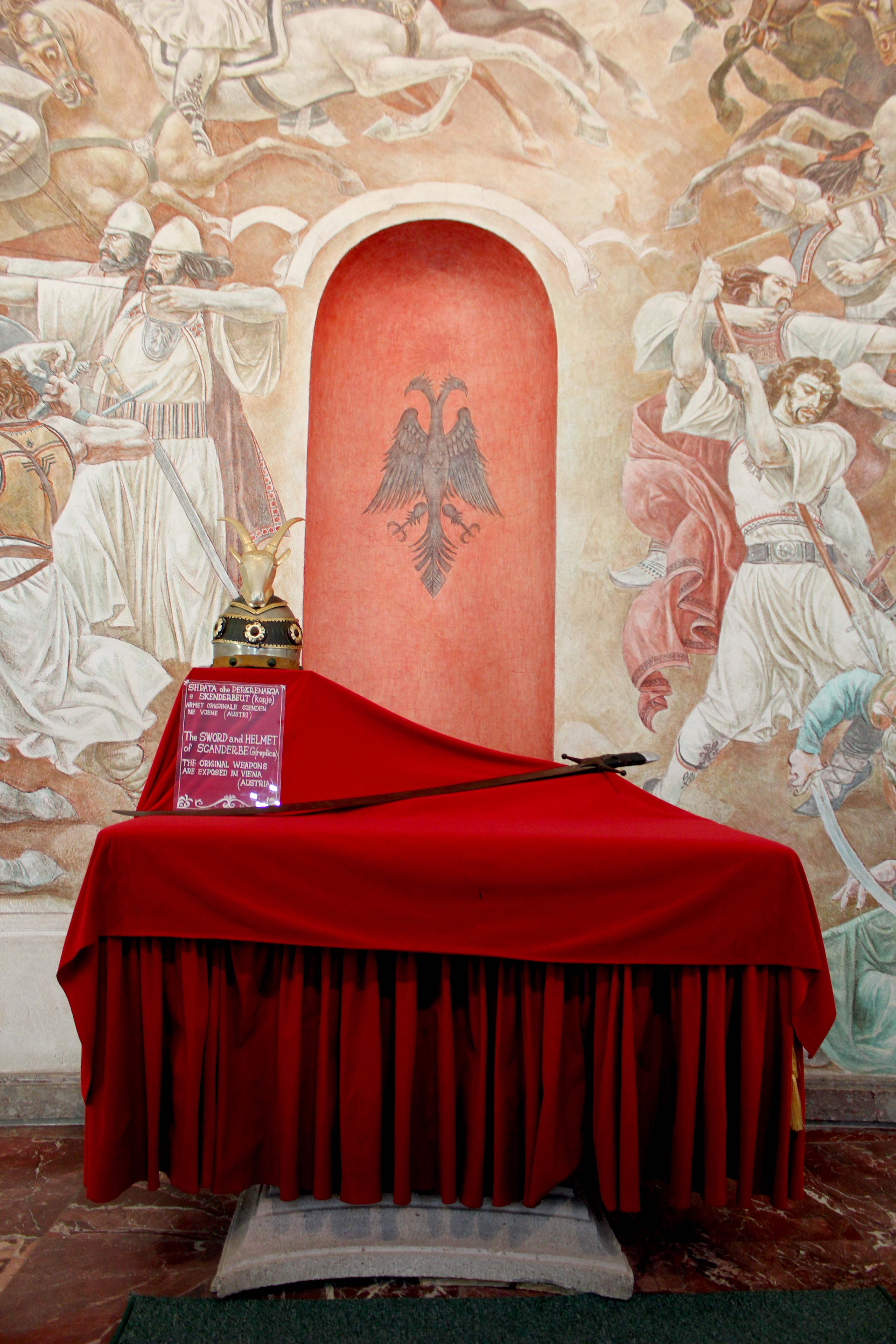 Kalaja e Krujes